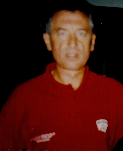 Mirosław Bulzacki